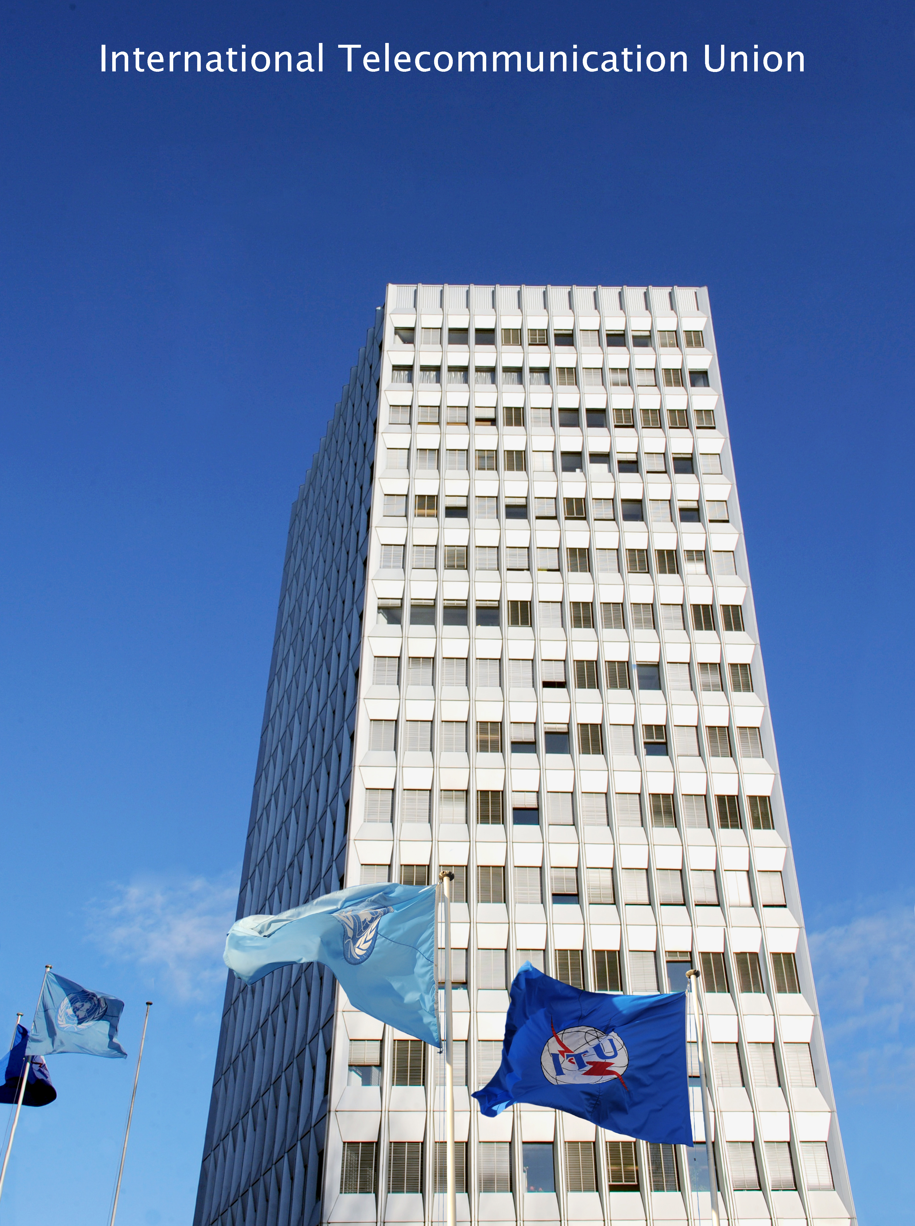 ITU Headquarters, Geneva © ITU / V. Martin